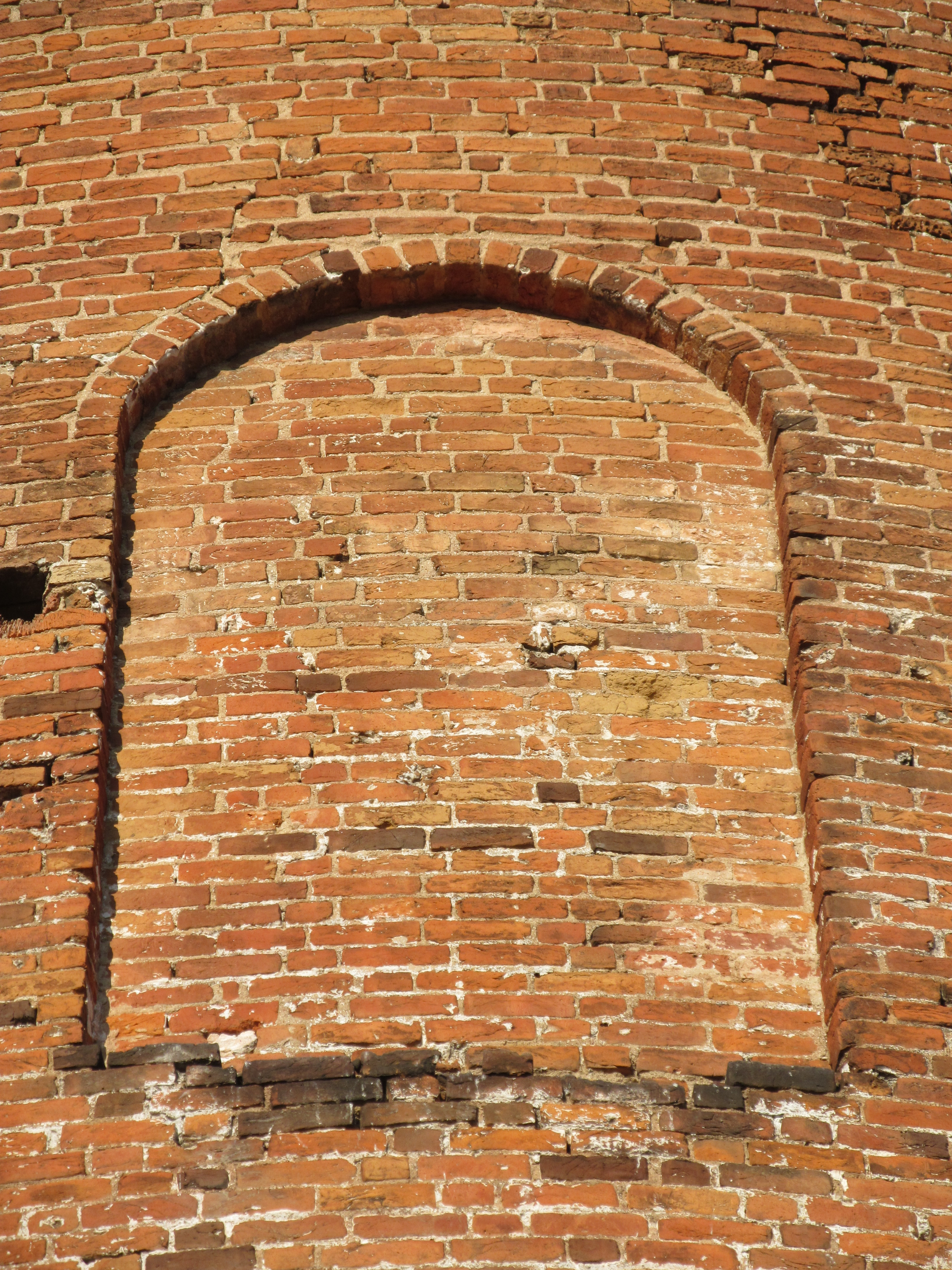 Декоративная ниша